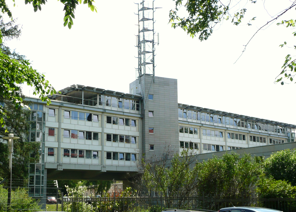 Erweiterungsbau der Polizeidirektion Hannover von 1998